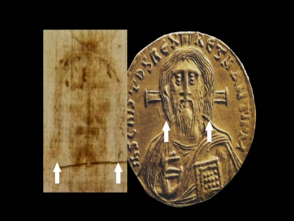 Comparaison Suaire de Turin et monnaie Justinienne